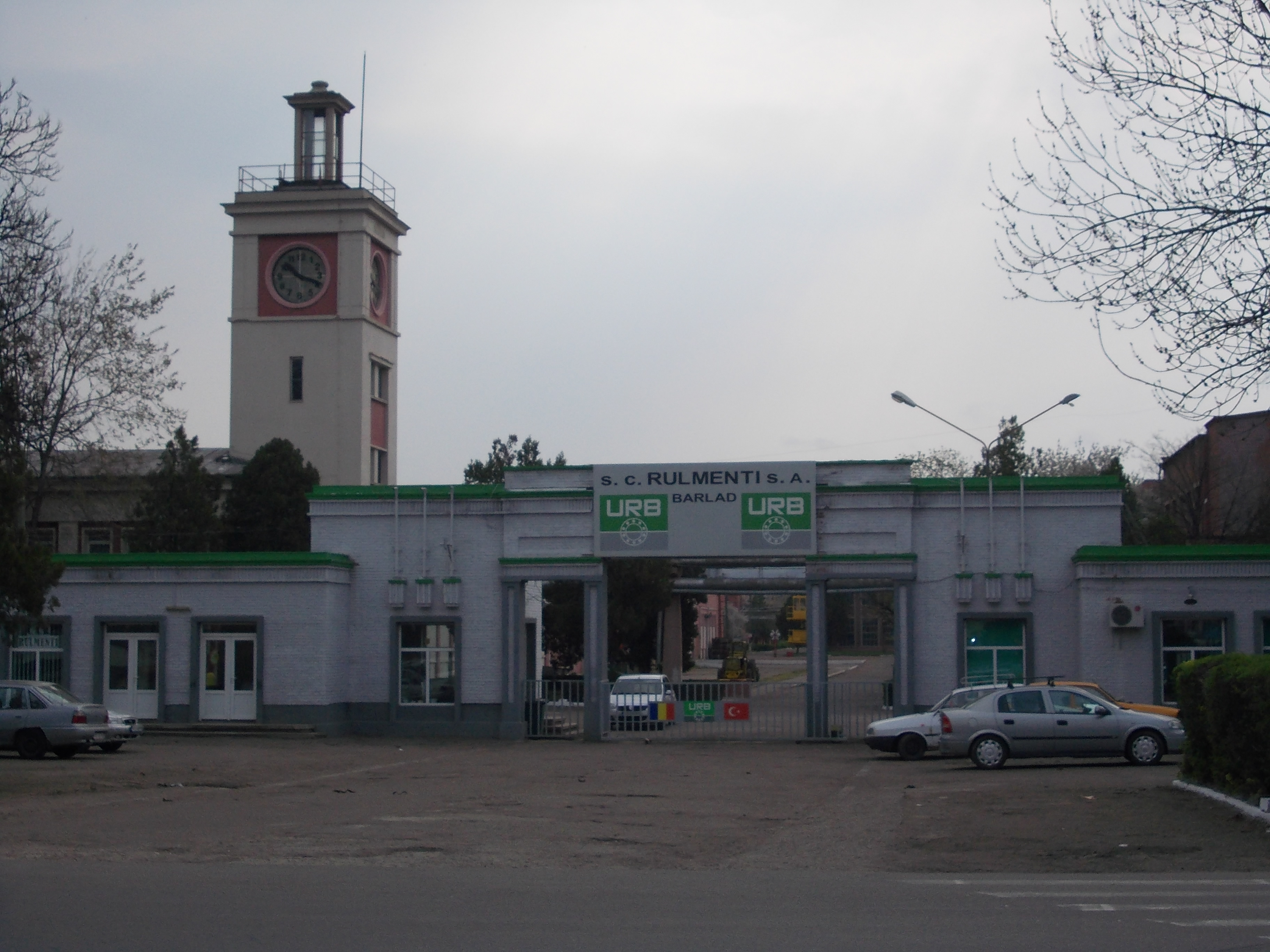 intrarea în fabrica Rulmentul din Bârlad 02